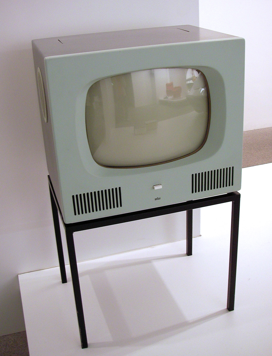 Fernsehgerät HF 1, 1958, Pinakothek der Moderne, München Hersteller: Max Braun, Frankfurt a. M., Deutschland Herbert Hirche 1910-2002